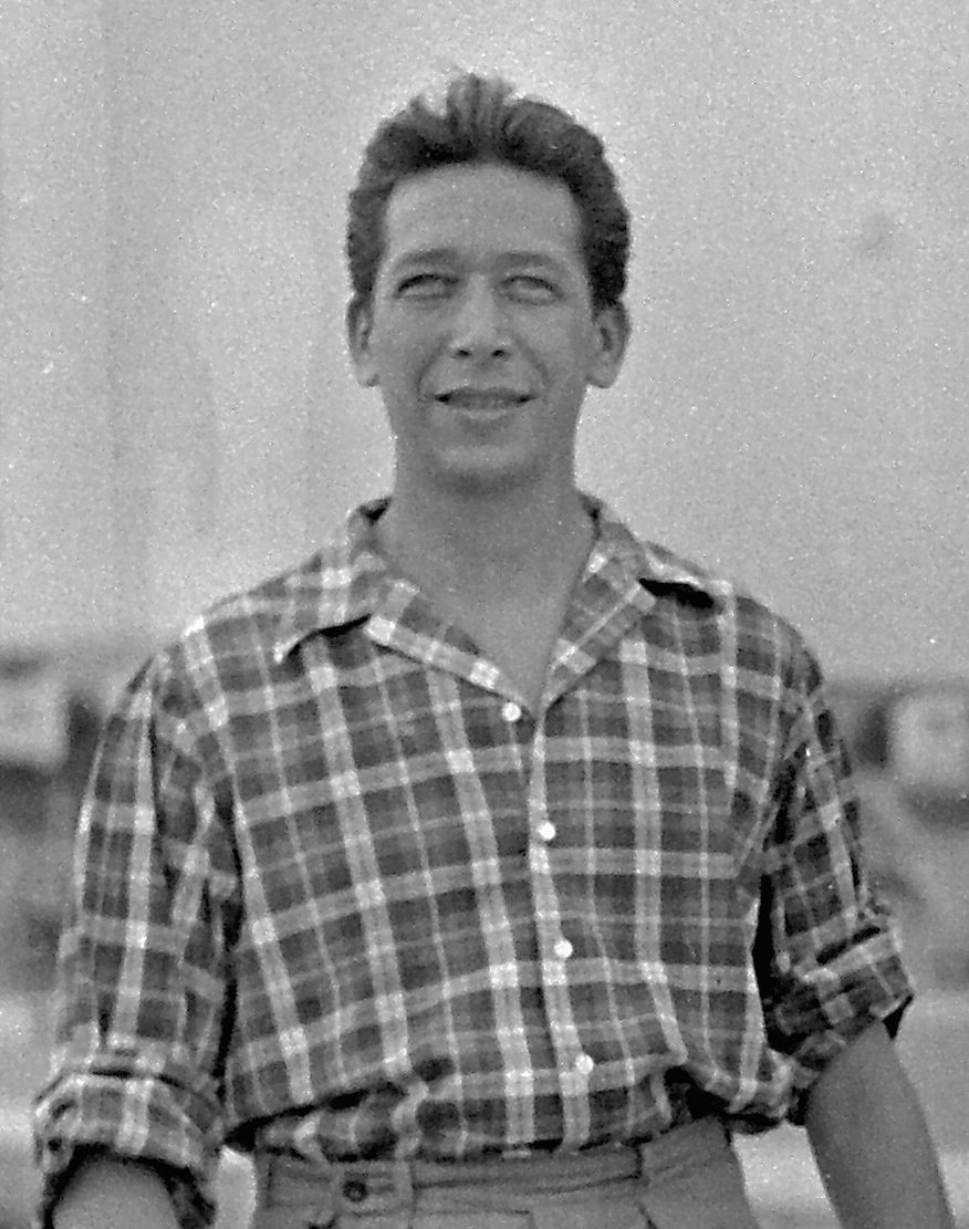 Rozsos István színész